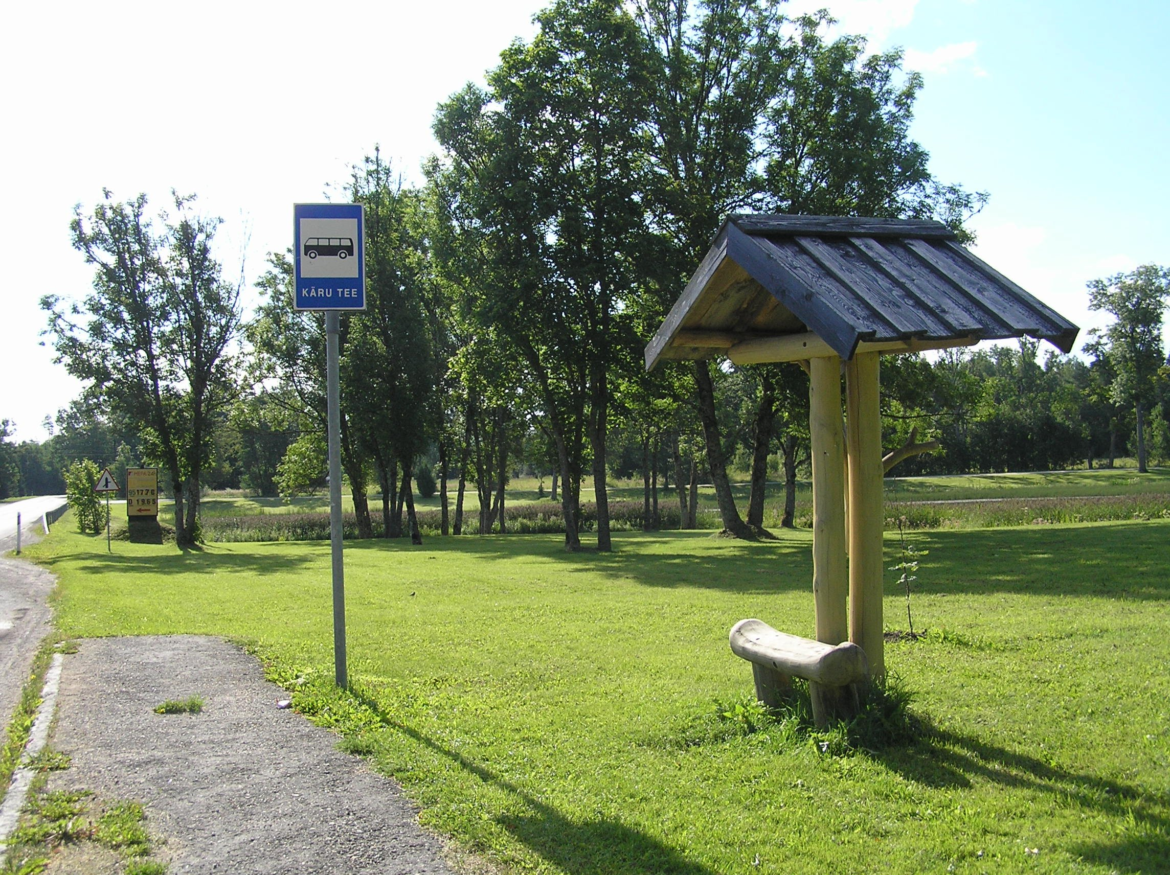 Käru tee bussipeatus